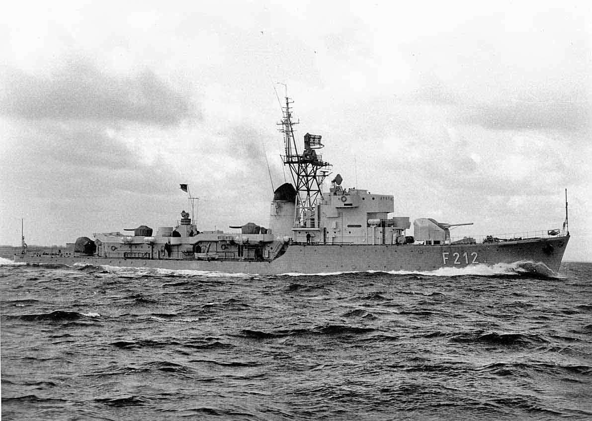 Die Schulfregatte Gneisenau (F212) der BundesmarineThis photo is dated 1967 and credited Official on p. 131 of "Blackman, Raymond V.B. Jane's Fighting Ships 1971–72. London: Sampson Low, Marston & Co. Ltd, 1971. ISBN 0-354-00096-9."